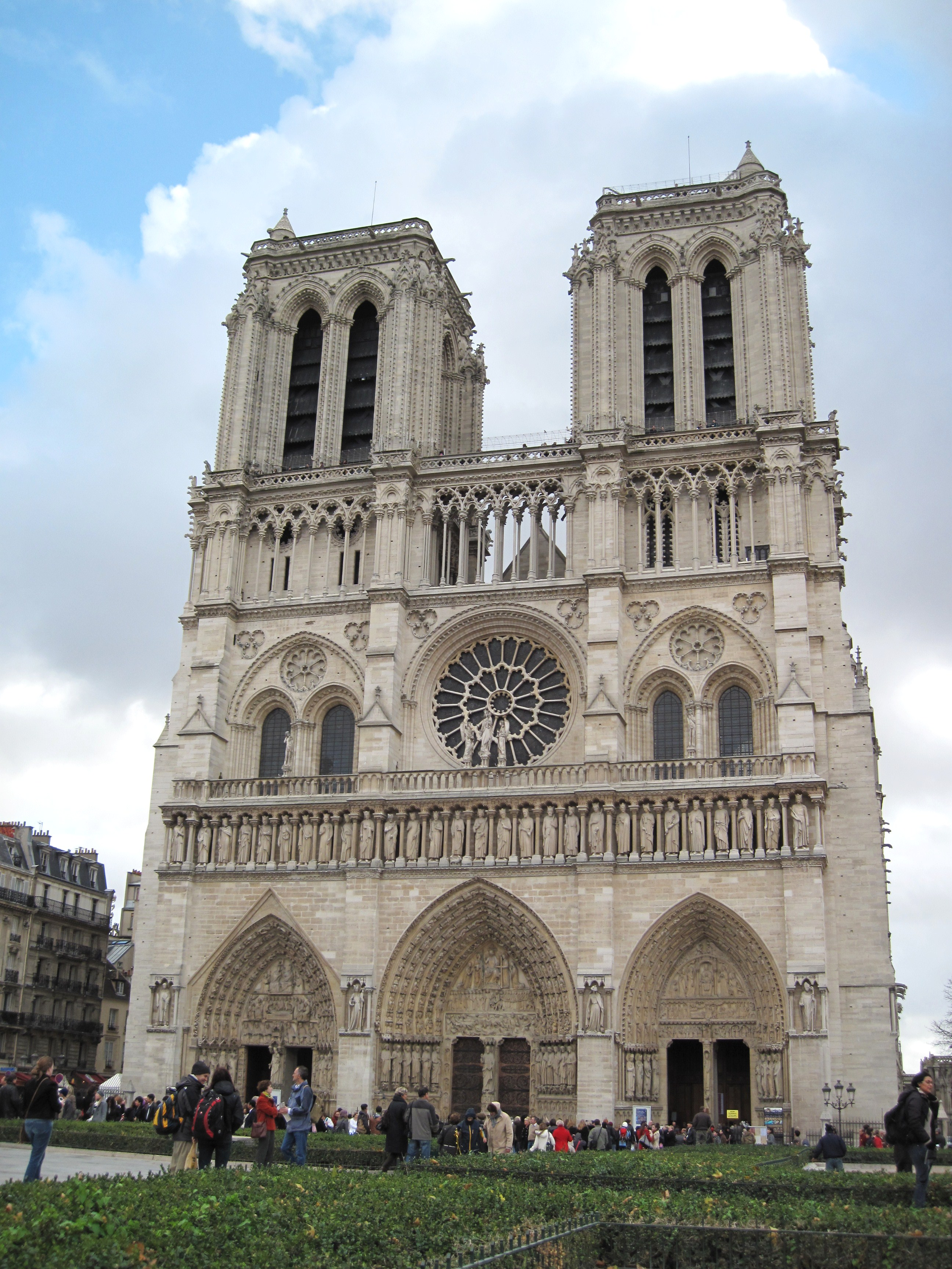 La façade ouest de la cathédrale Notre-Dame de Paris. Paris, France.